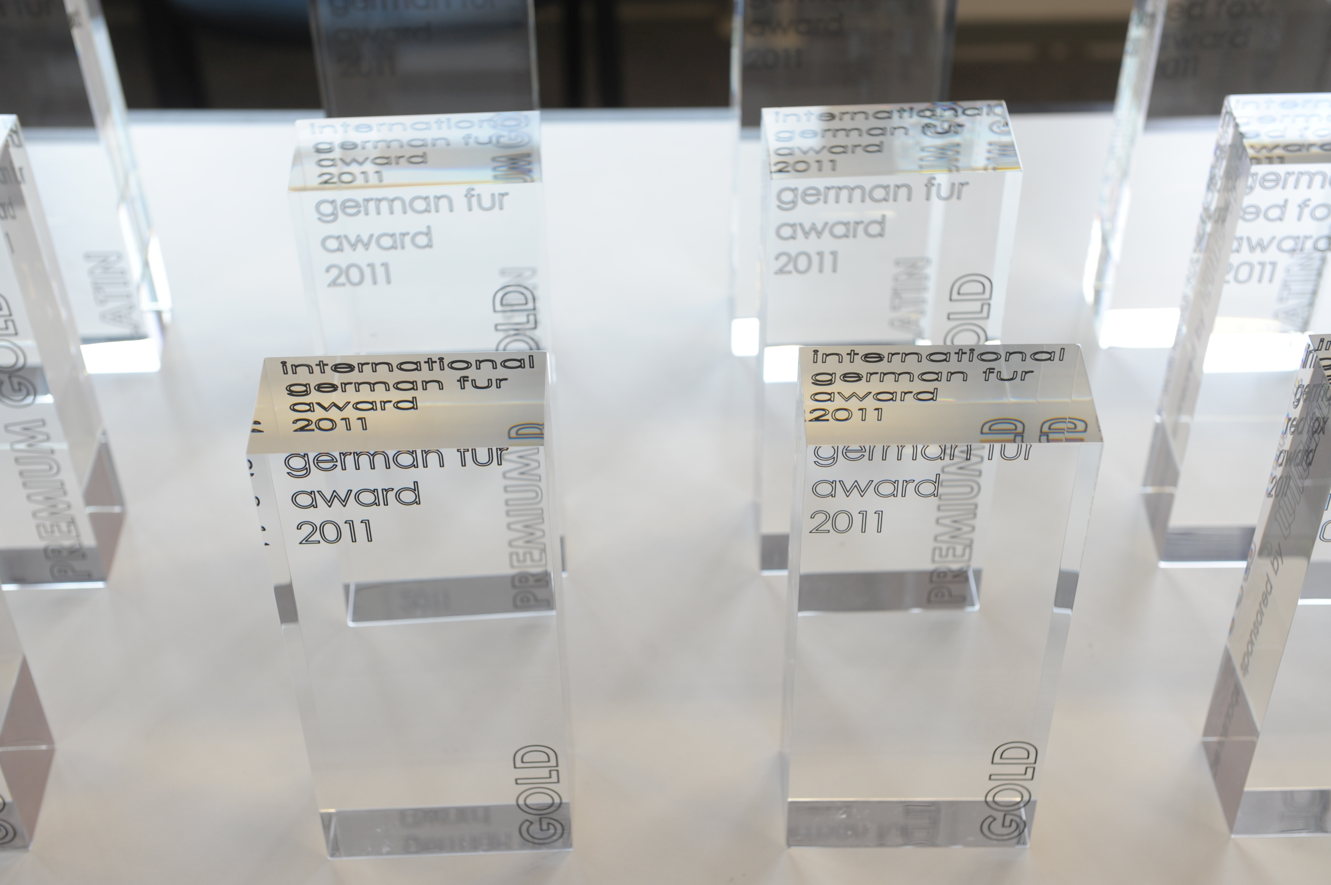 International German Fur Award 2011 des Kürschnerhandwerks.